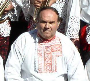 Mistrinanka